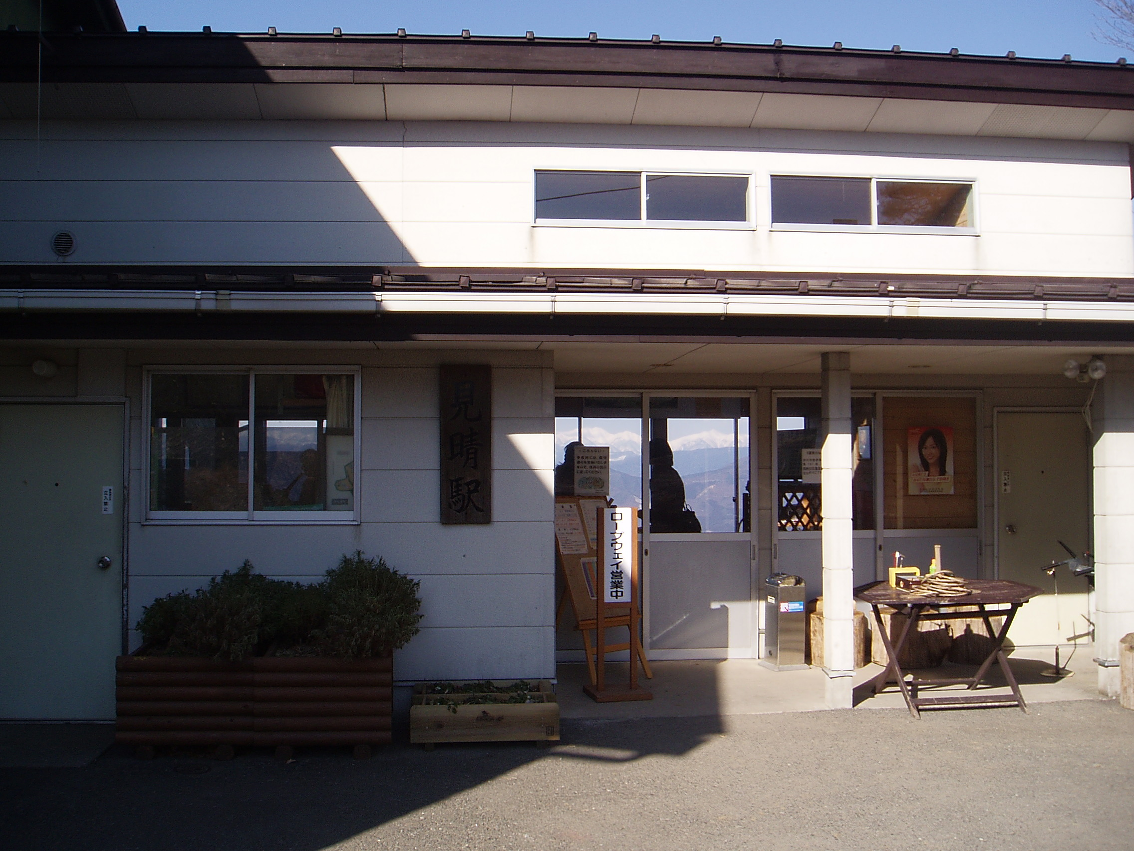 見晴駅駅舎